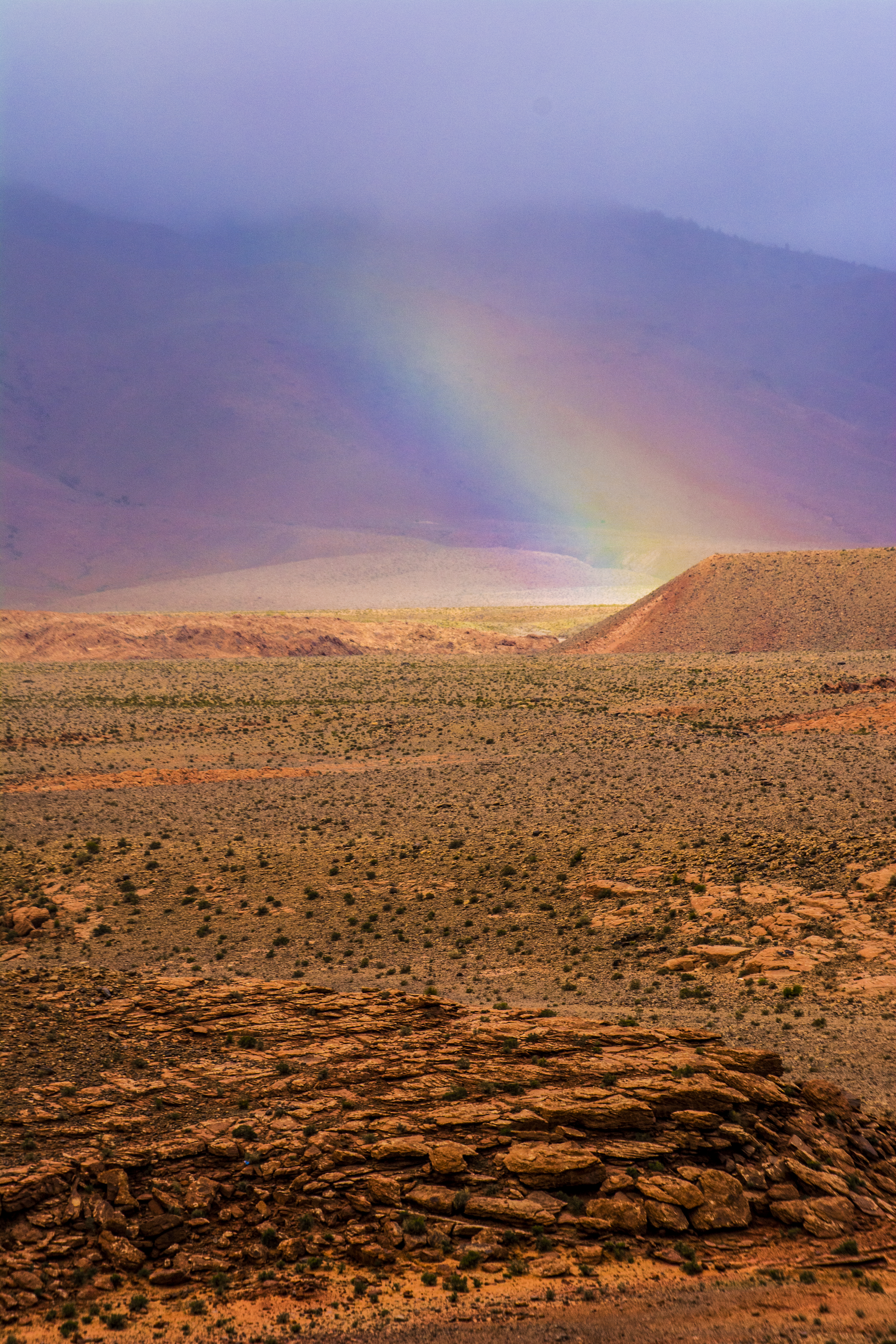 arc en ciel dans la region de tiout wilaya de Naama cote de Jbel Smain Laaouedj